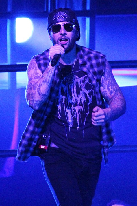 Avenged Sevenfold @ 3 Arena, Dublino. 7 gennaio 2017.